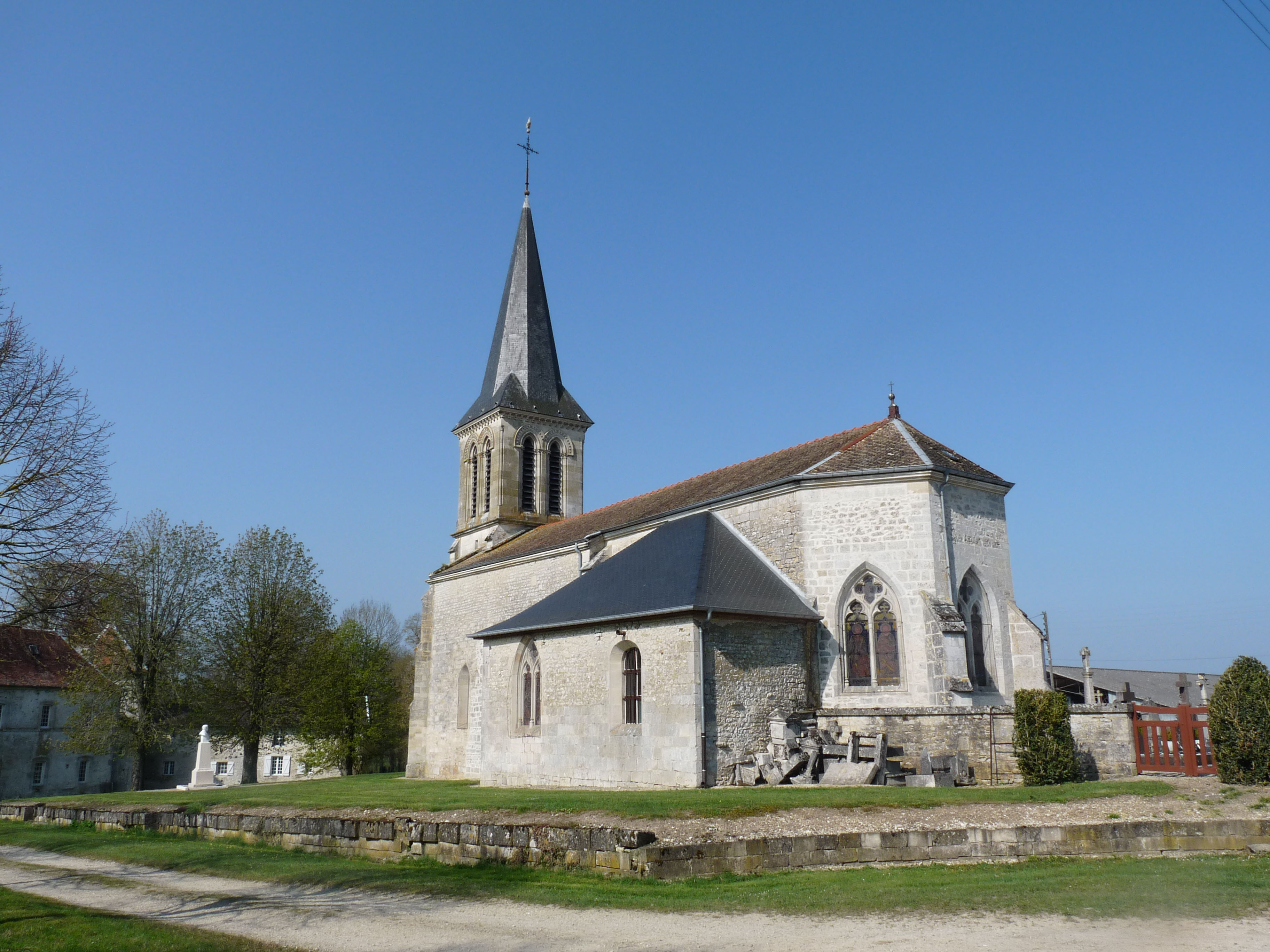 Eglise d'Echenay (Haute-Marne)